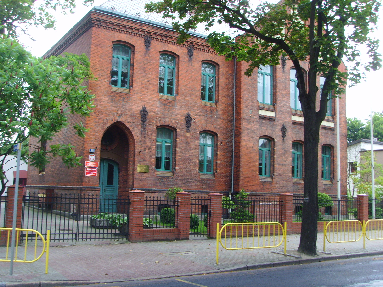 W tym budynku mieścił się Powiatowy Urząd Bezpieczeństwa Publicznego